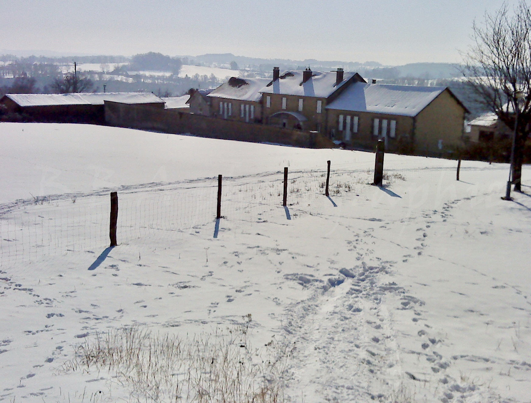 Vue Est en hiver 2012, l'école de Brillac sous la neige, France